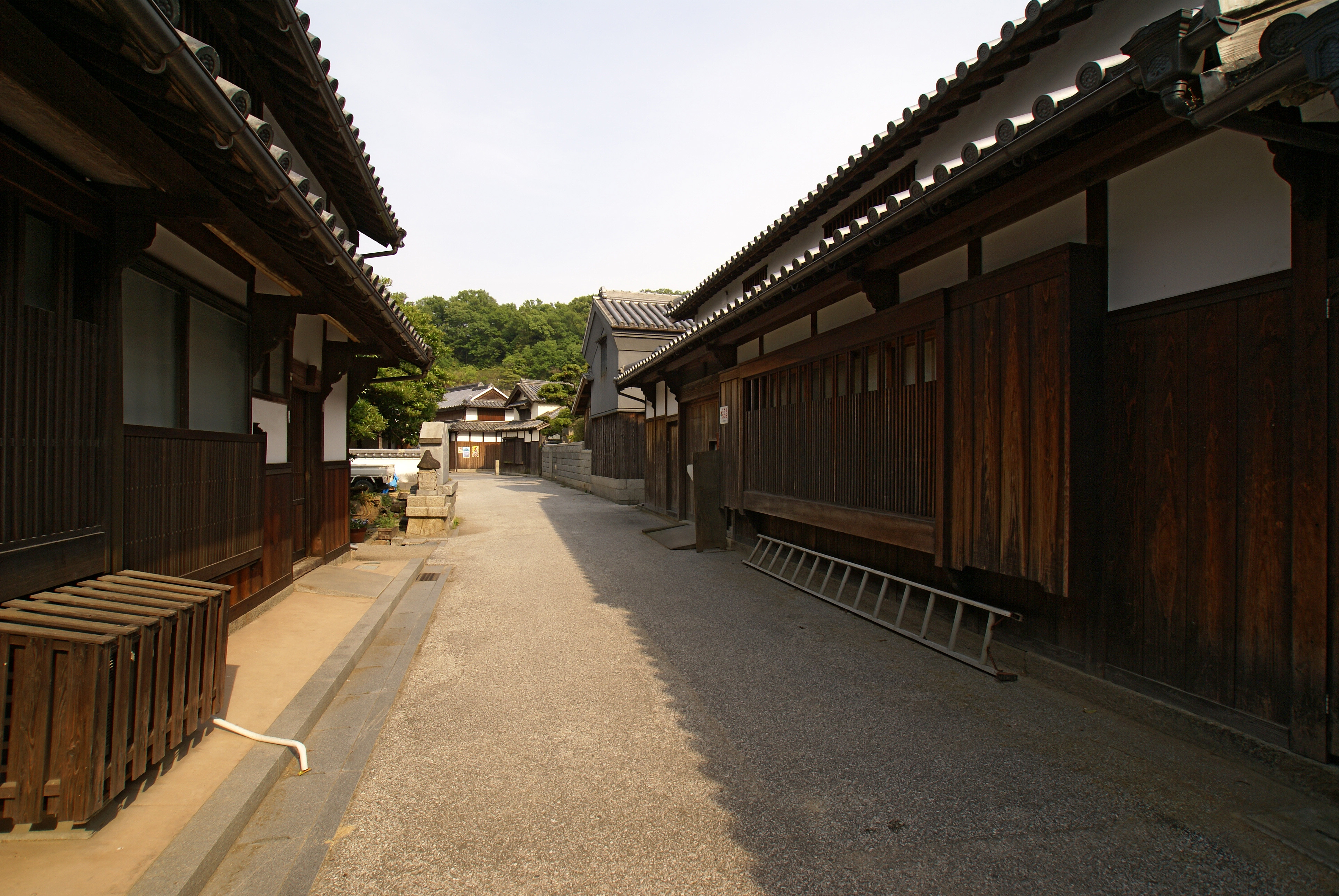 Kasajima, Hon-jima of Shiwaku Islands (Marugame, Kagawa prefecture, Japan)